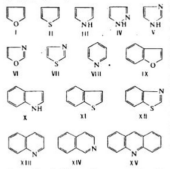 Հետերոցիկլային միացություններ